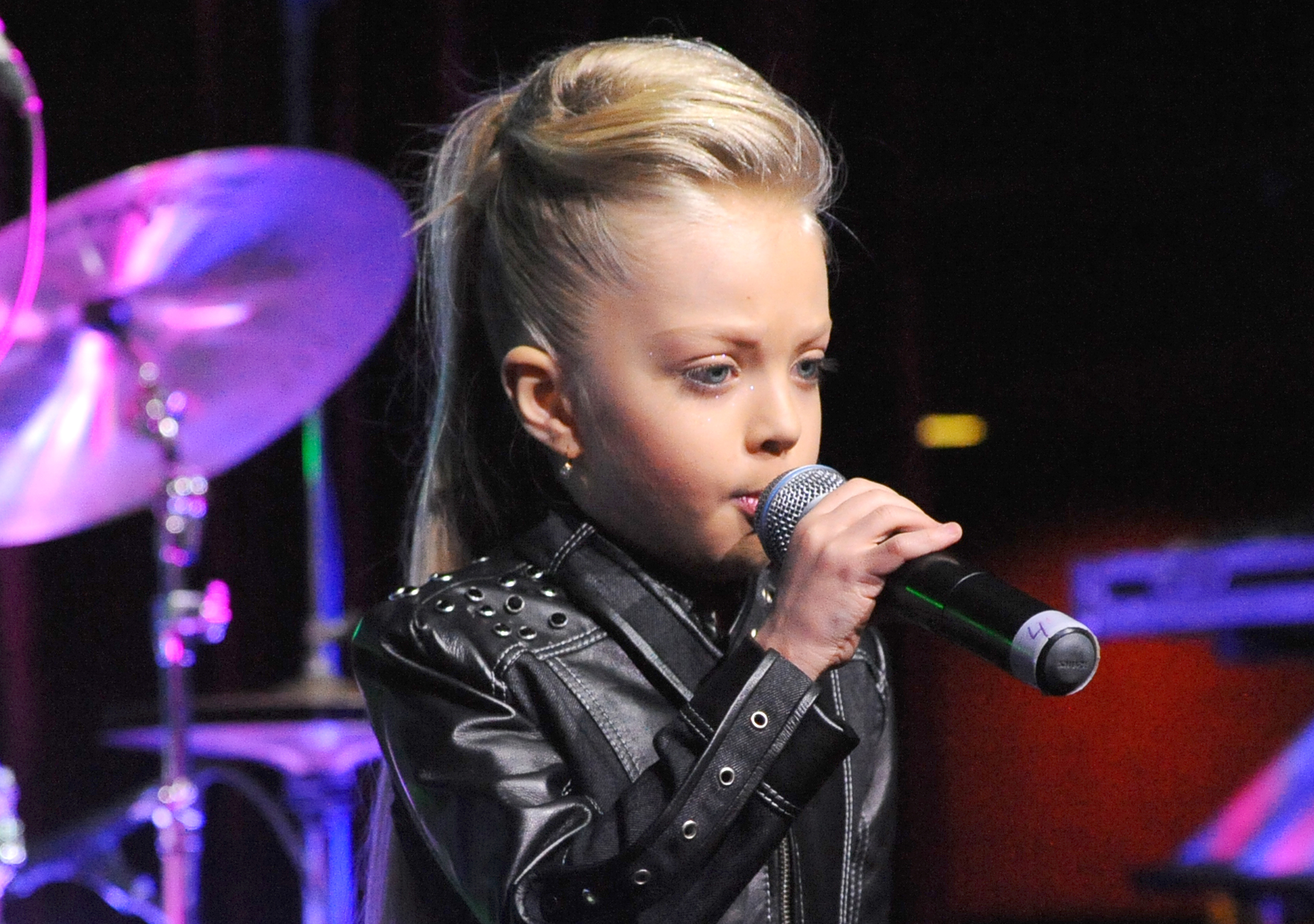 Анастасия Игоревна Петрик